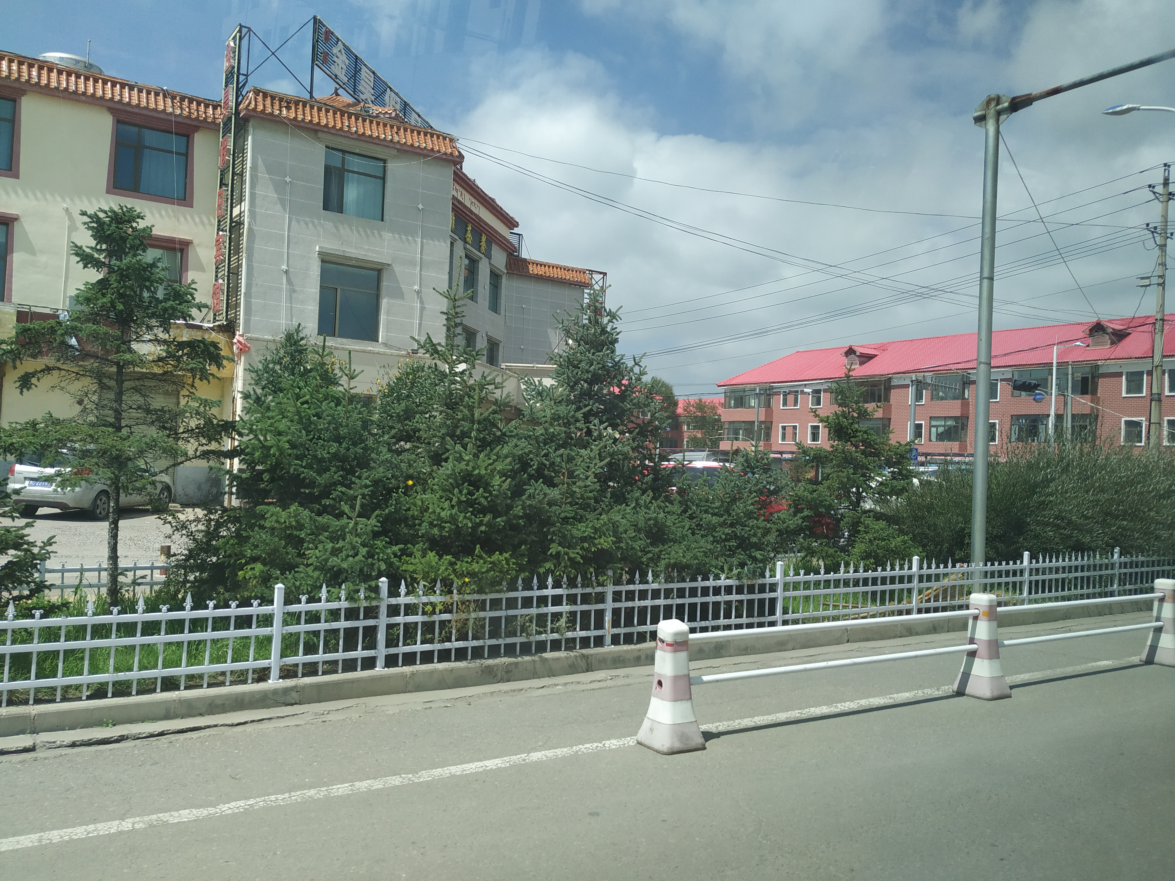 中文（中国大陆）: 海北藏族自治州西海镇